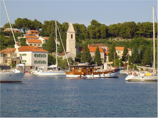 Prvić Luka